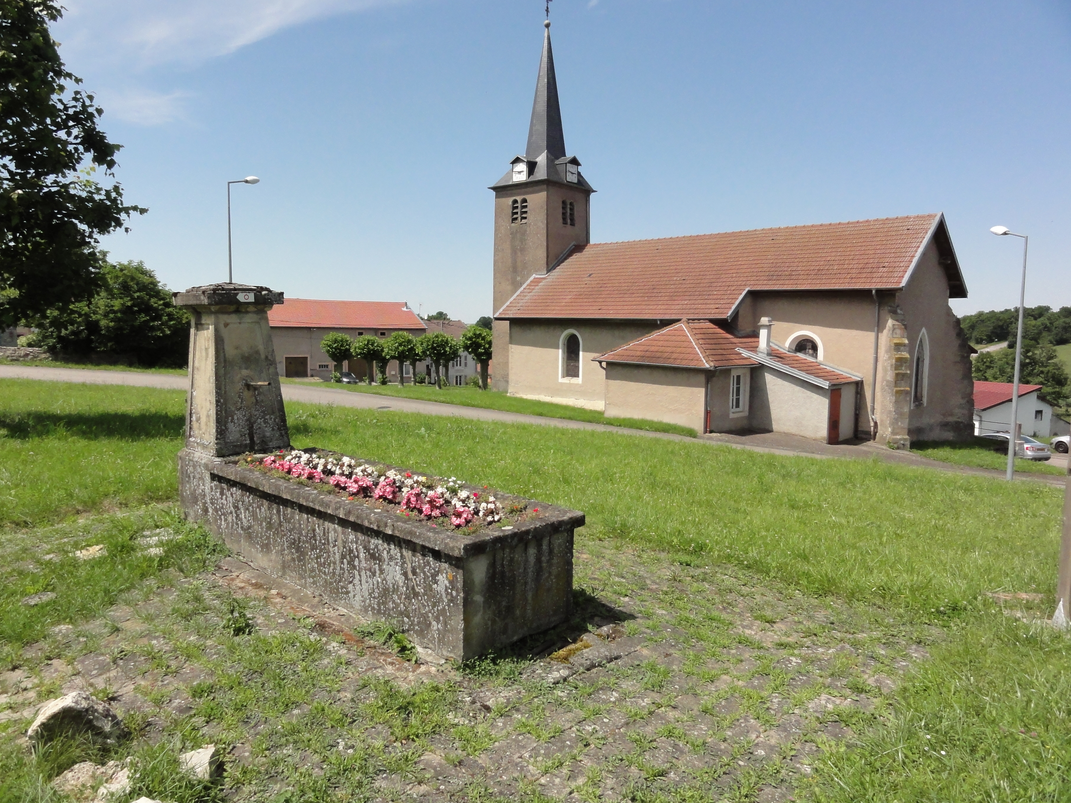 Montigny (M-et-M) église (04) et fontaine